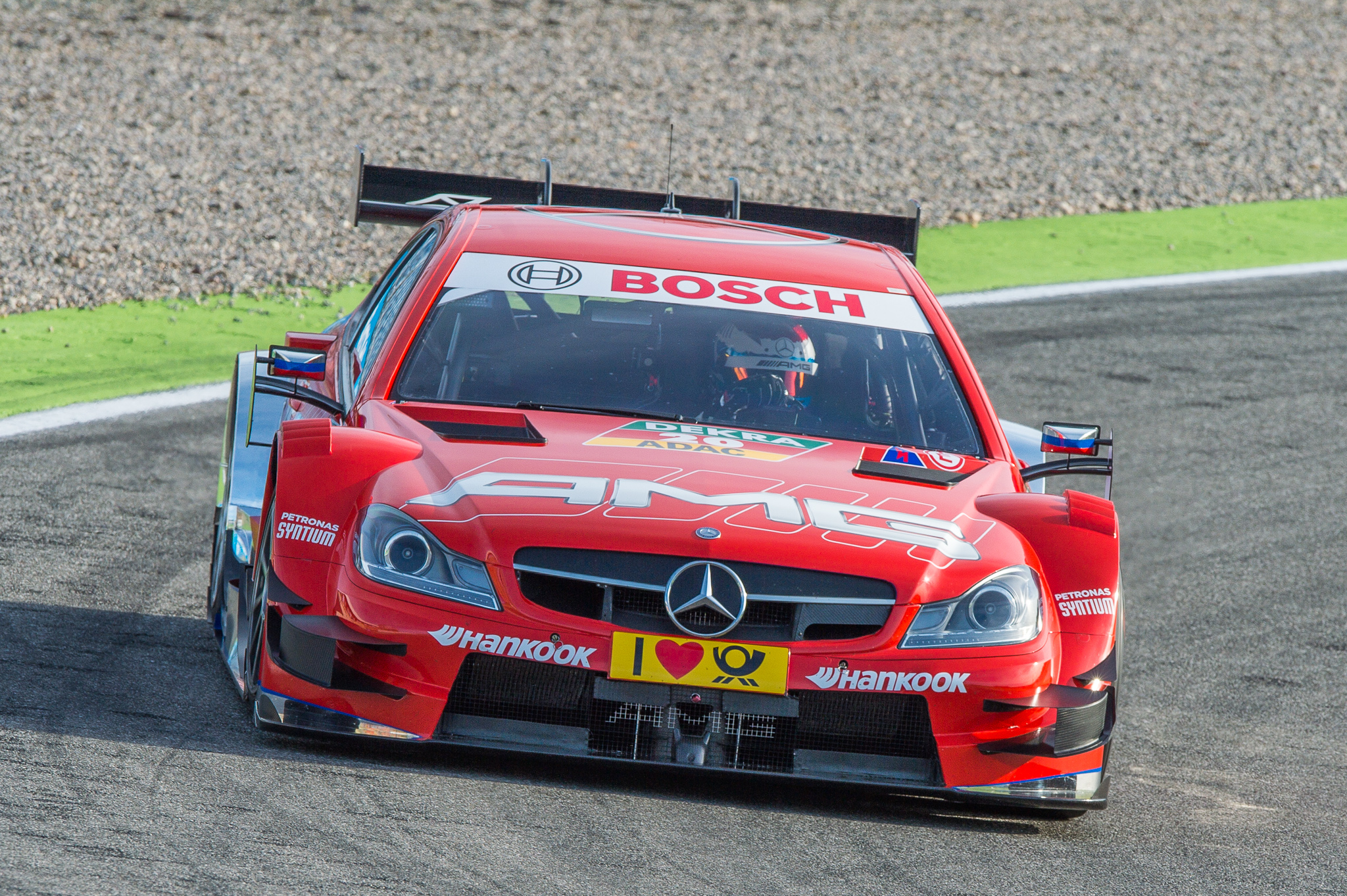 DTM,Deutsche Tourenwagen Masters,Hockenheimring,Mercedes AMG C-Coupe,Motorsport,Mücke Motorsport,Vitaly Petrov